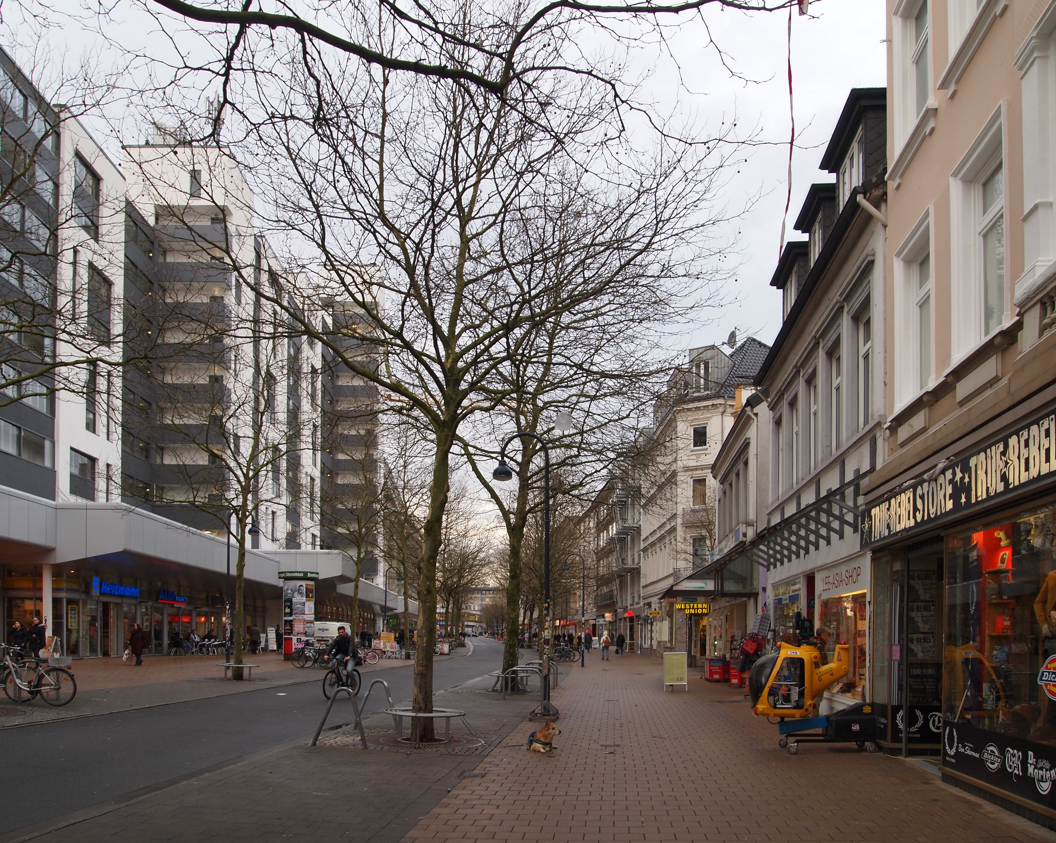 große bergstraße hamburg-altona mit neuem forum